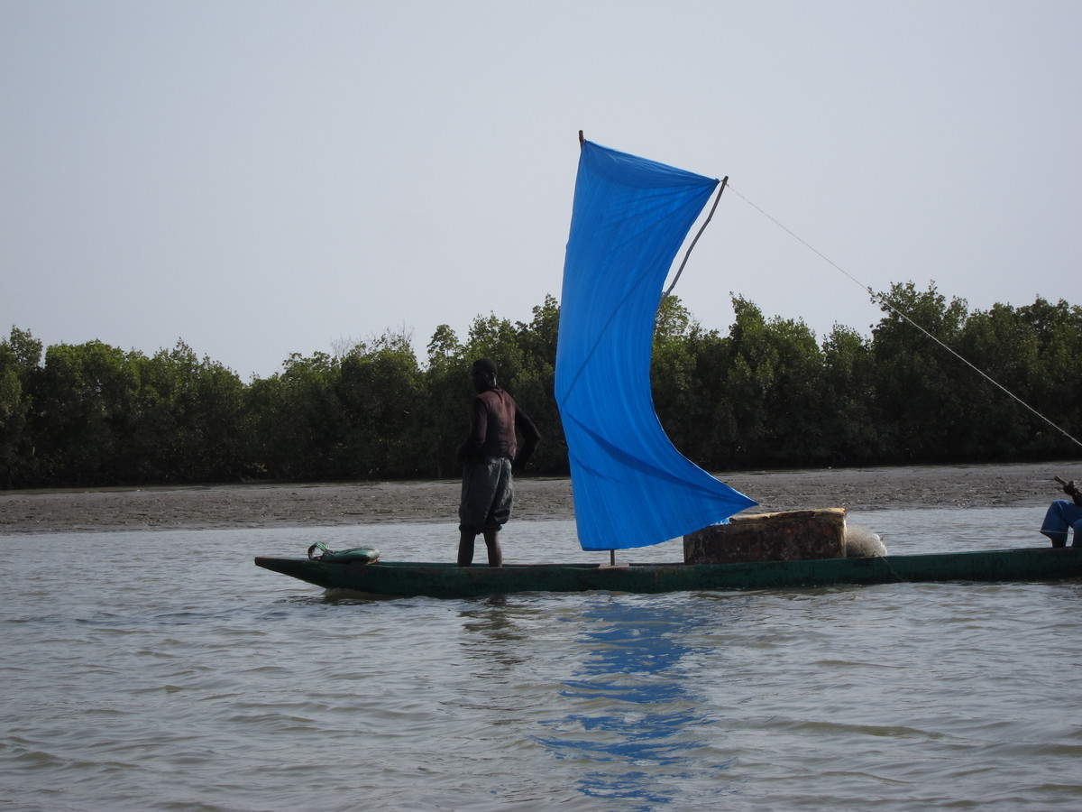 Pirogue gréée d'une voile à livarde. Ziguinchor (Casamance, Sénégal), 4 avril 2012. La livarde, sur des gréements rudimentaires, permet de supprimer la bôme horizontale sur la bordure de la voile.